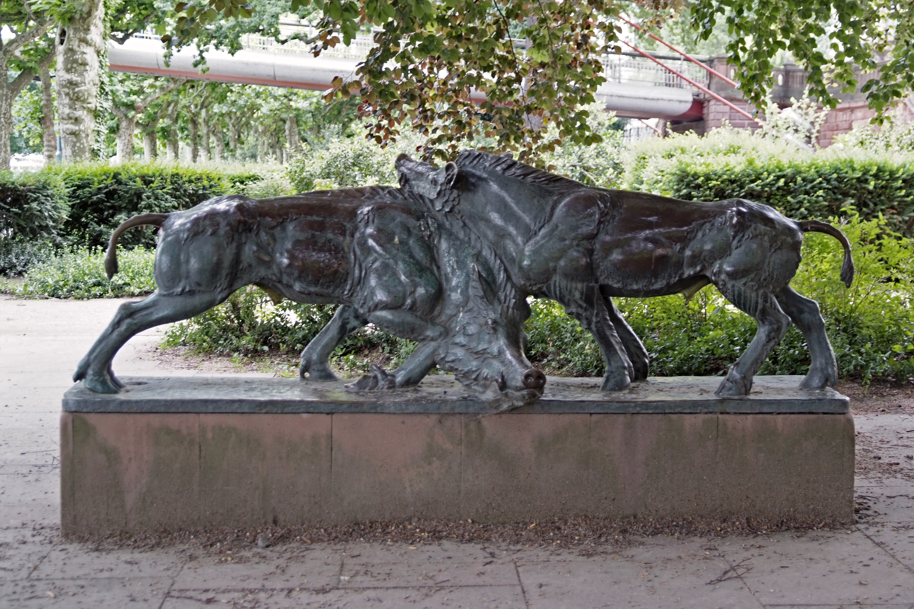 Kämpfende Keiler, Bronzestatue am Nizzaufer in Frankfurt am Main „Ebergruppe“, Paul Kratz, um 1900